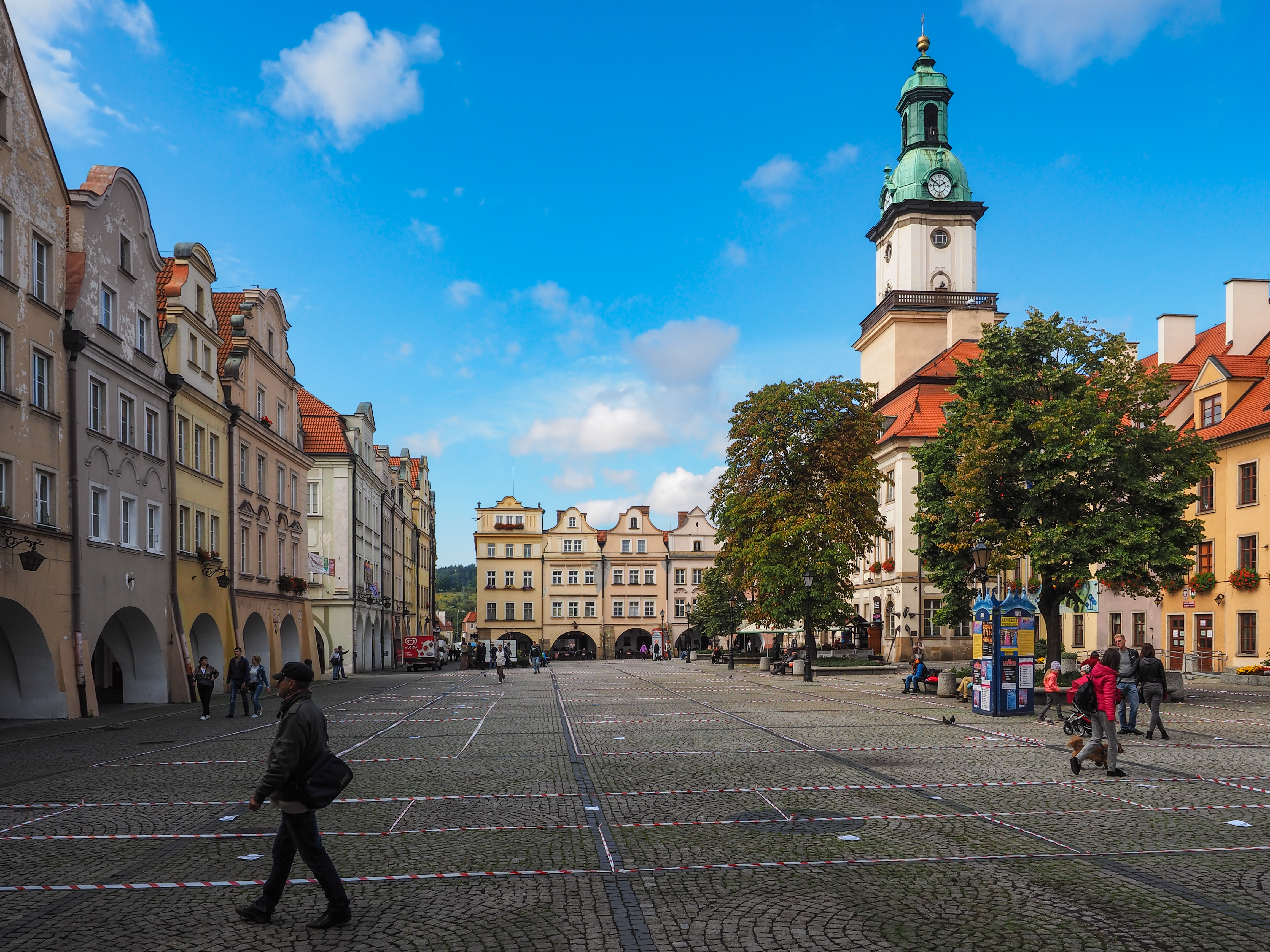 Jelenia Góra, Miasto (ośrodek historyczny) Wikidata has entry Q30055459 with data related to this item.